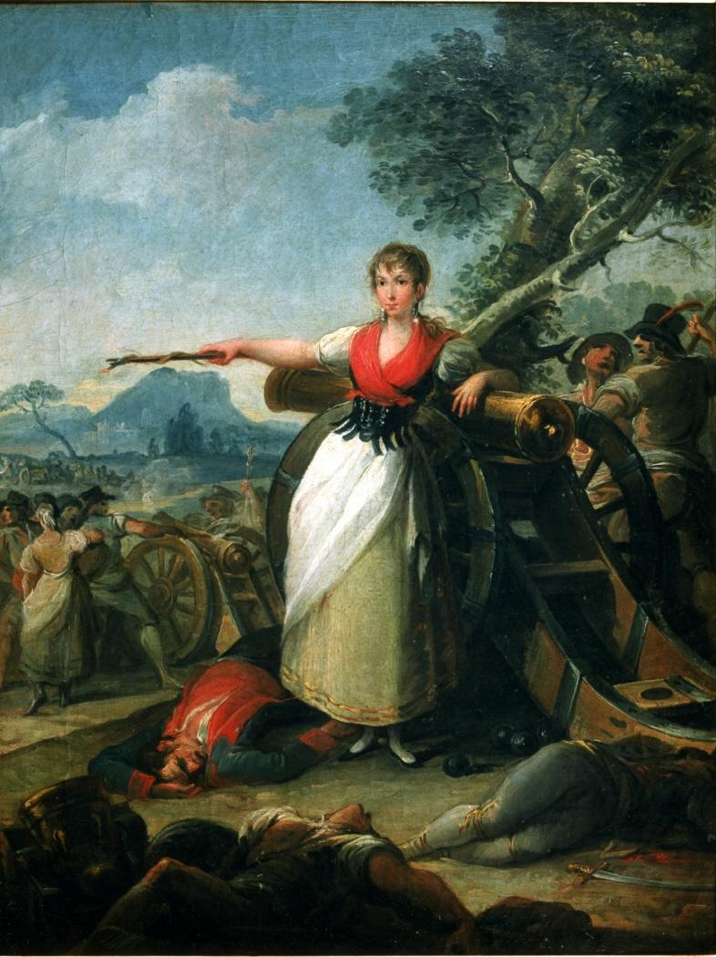 La obra representa a la heroína española Agustina de Aragón (1786-1857).